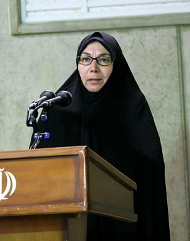 پروانه معصومی در دردیدار رهبر